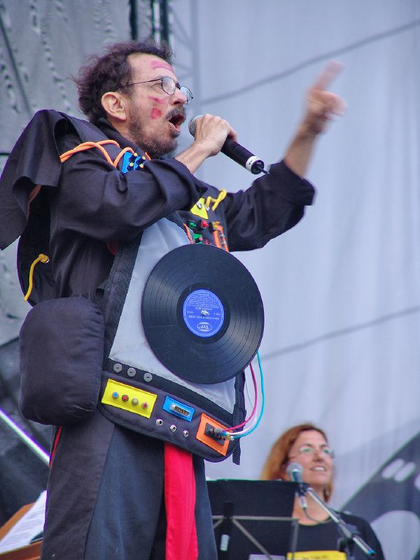 Tom Zé, músico brasileiro.